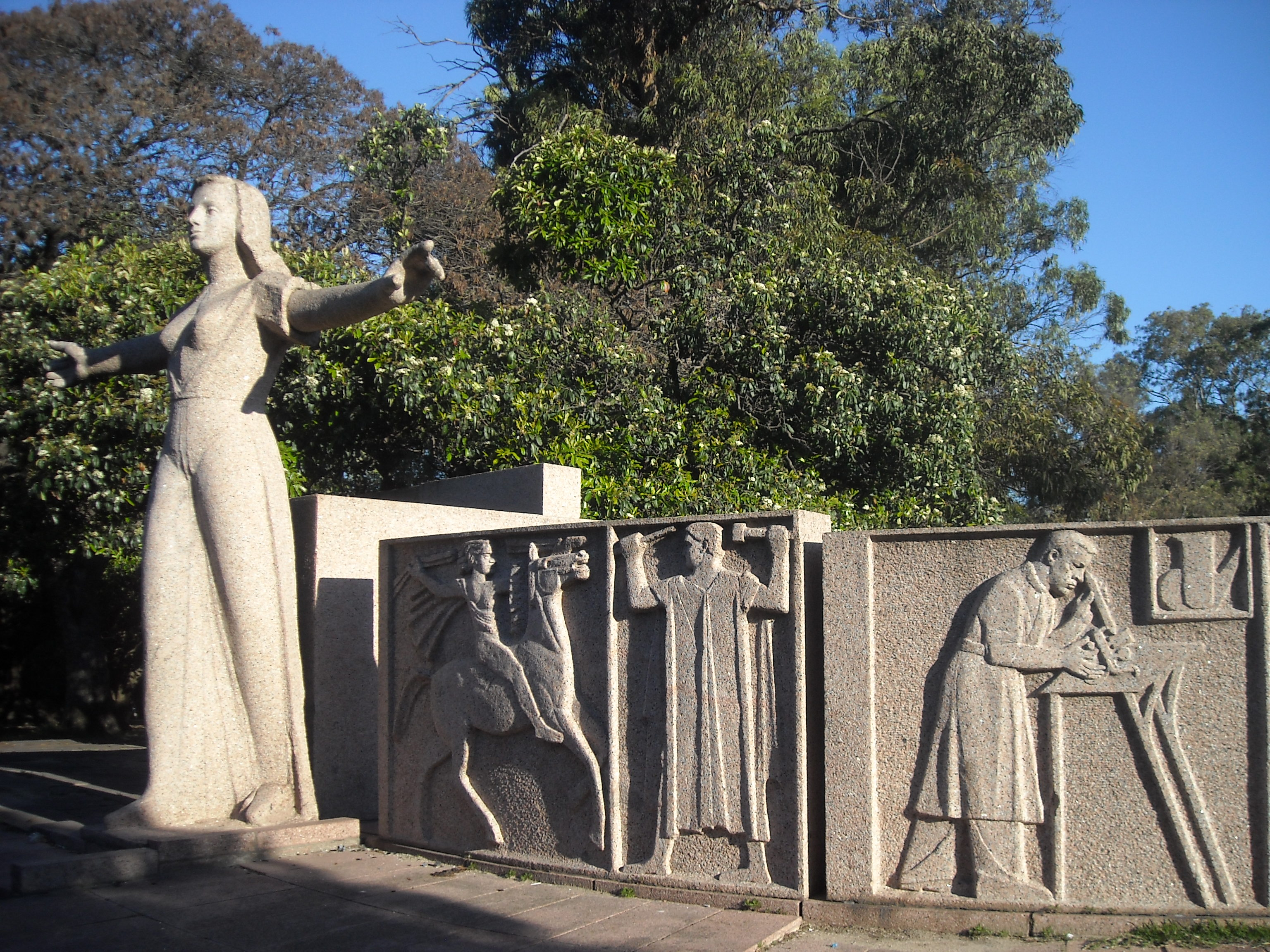 Al Maestro. Ubicada en el departamento de Montevideo